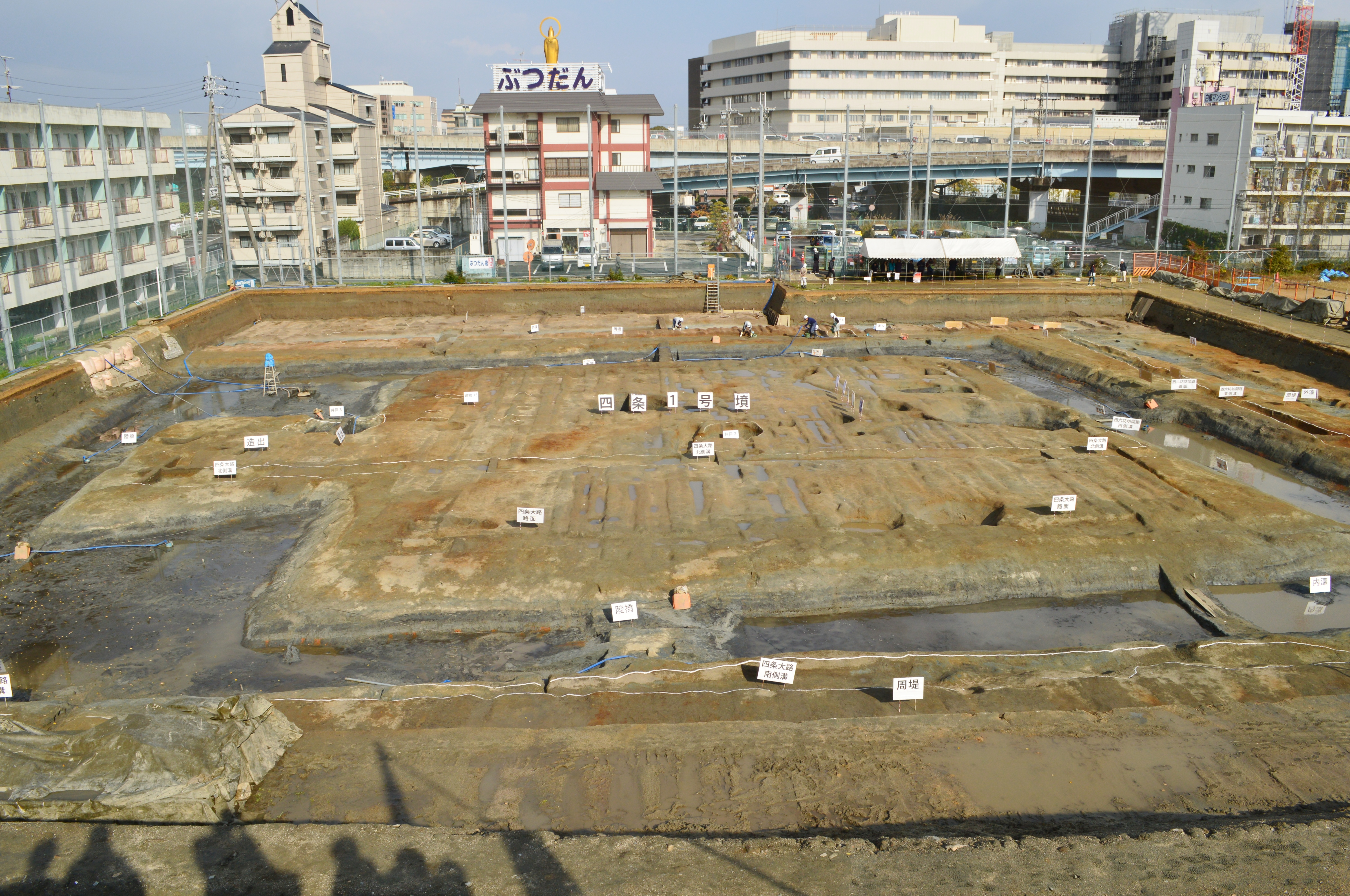 四条1号墳 全景 (2017年発掘調査時)